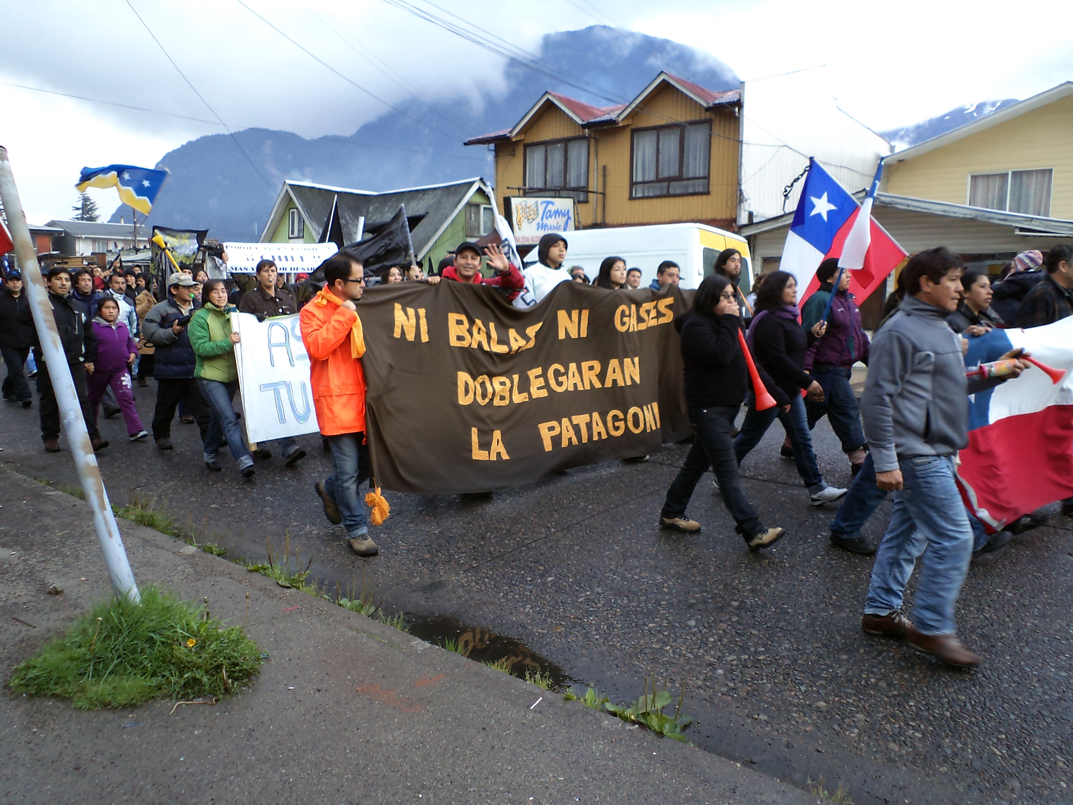 Protestas en el Puente Presidente Ibáñez en Puerto Aysén, Chile.